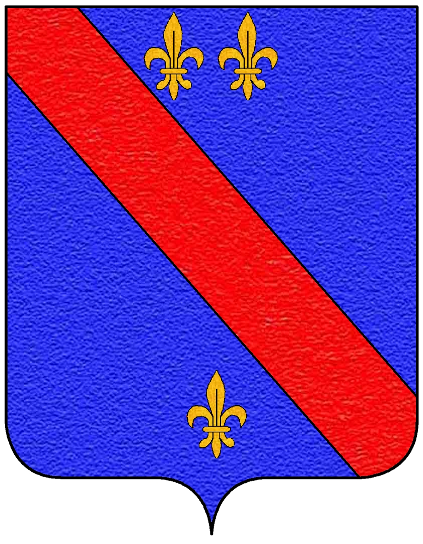 Stemma della famiglia Bourbon del Monte